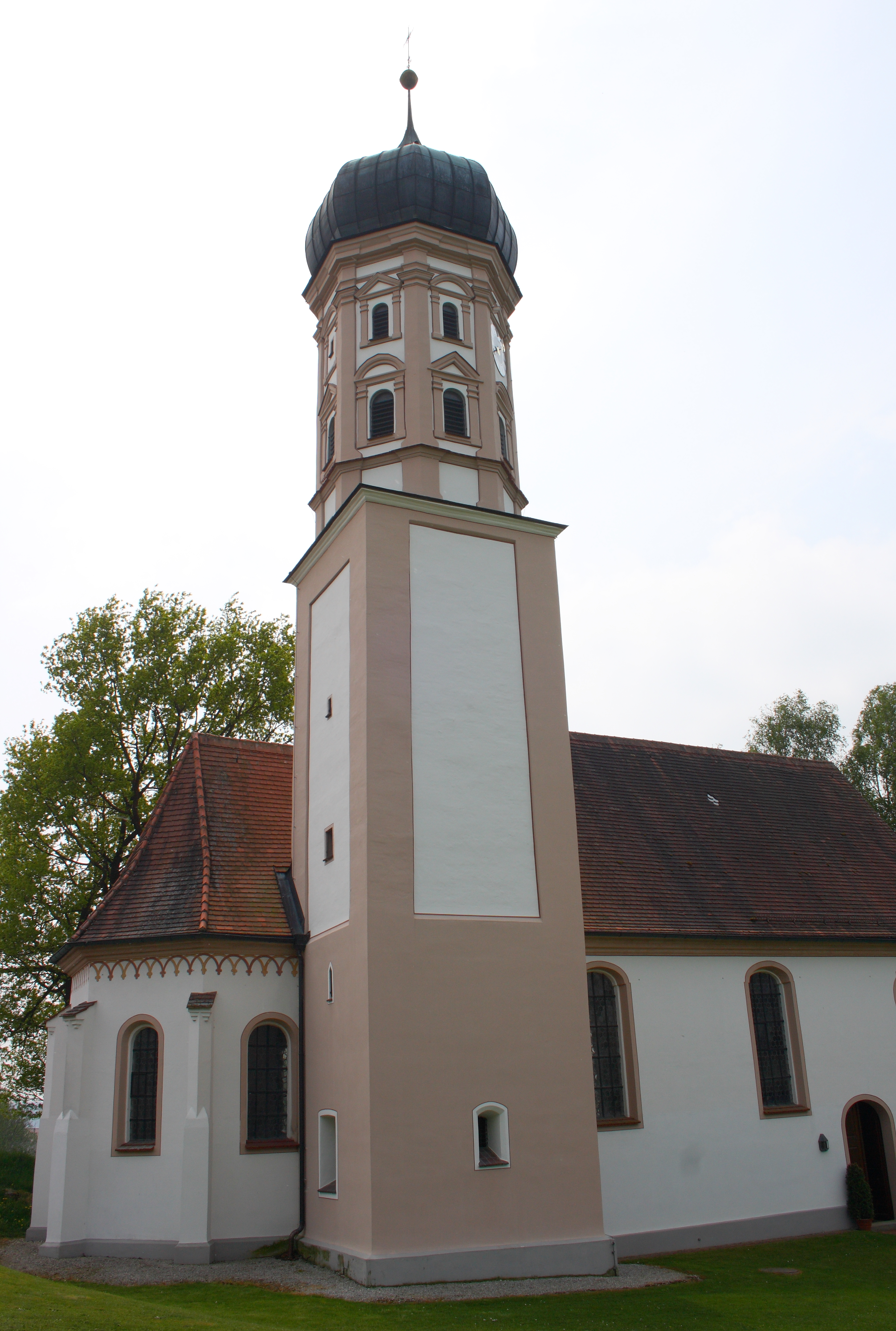 Katholische Filialkirche St. Maria Magdalena in Horgauergreut, einem Ortsteil von Horgau im Landkreis Augsburg (Bayern), Ansicht von Norden, Turmuntergeschosse aus dem späten 15. Jahrhundert, Ende 17./Anfang 18. Jahrhundert erhöht